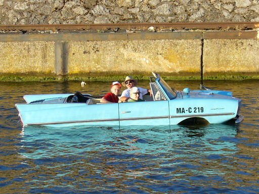 Amphicar in Stuttgart-Hafen 18. Juni 2005